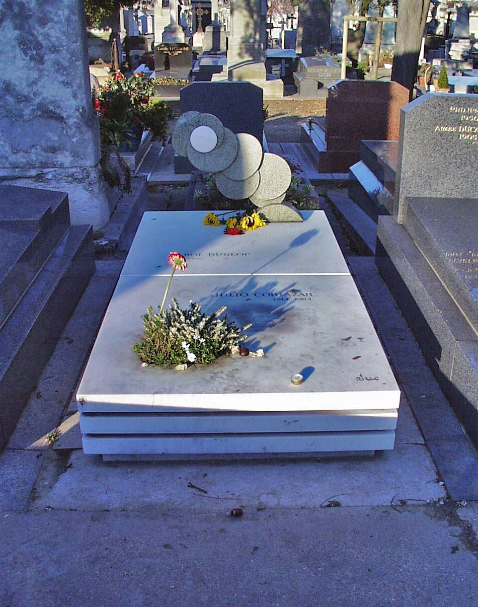 Grab von Julio Cortazar, Paris - Cimetière Montparnasse.